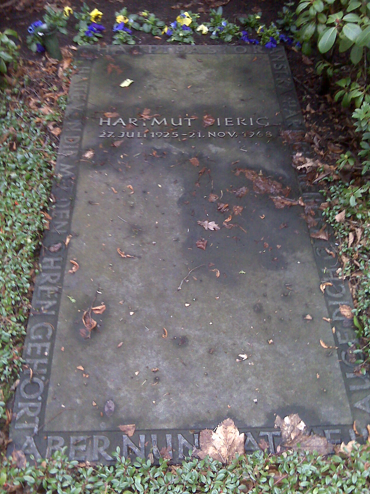 Grabplatte des Hamburger Hauptpastors